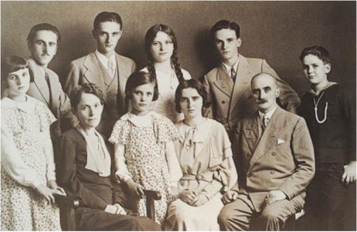 Familia Beretta em 1933, 25º Aniversario de Matrimônio dos pais